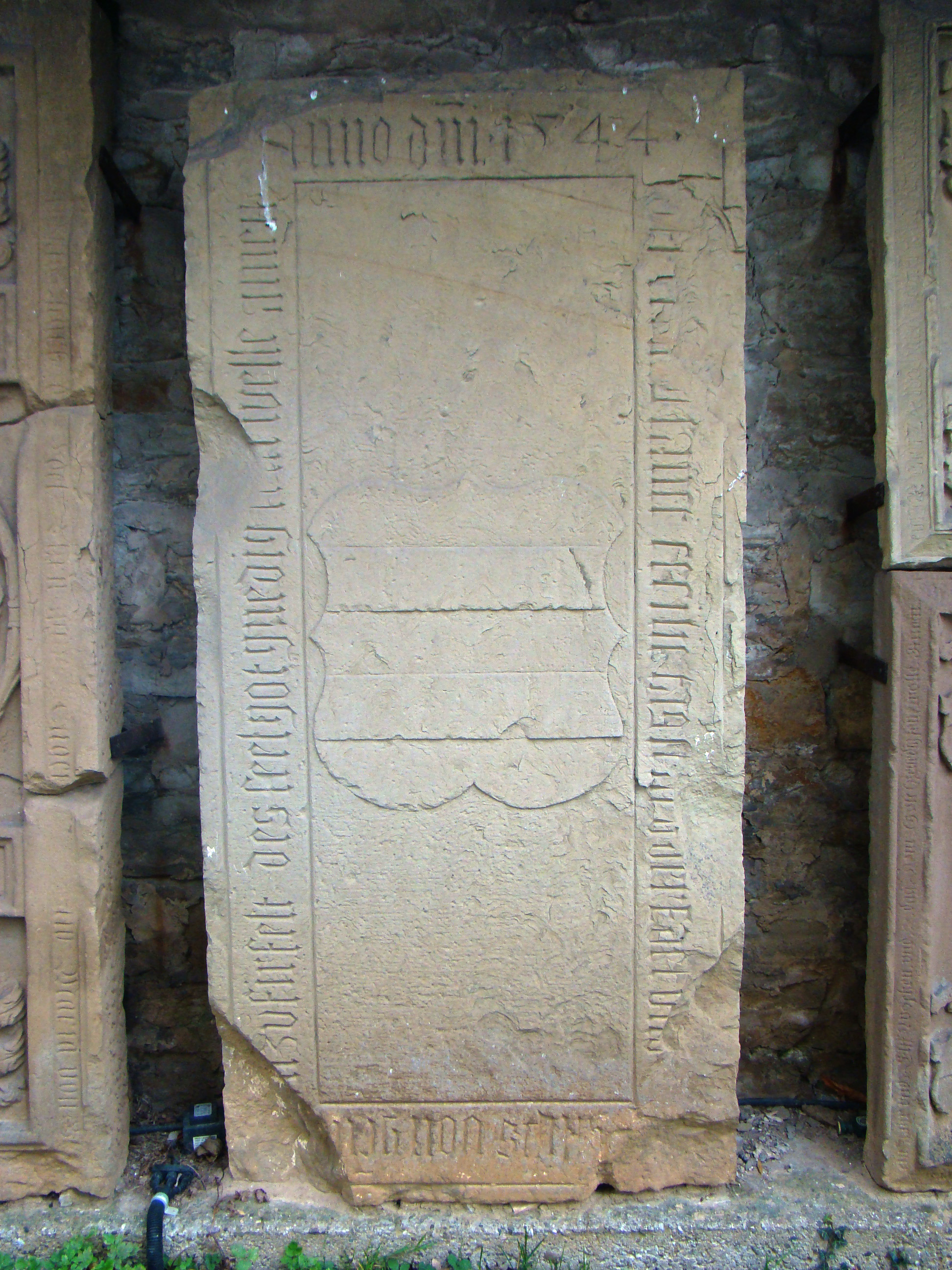 Historische Grabmale beim Unterschloss Gemmingen: Philipp von Gemmingen zu Fürfeld († 1544)